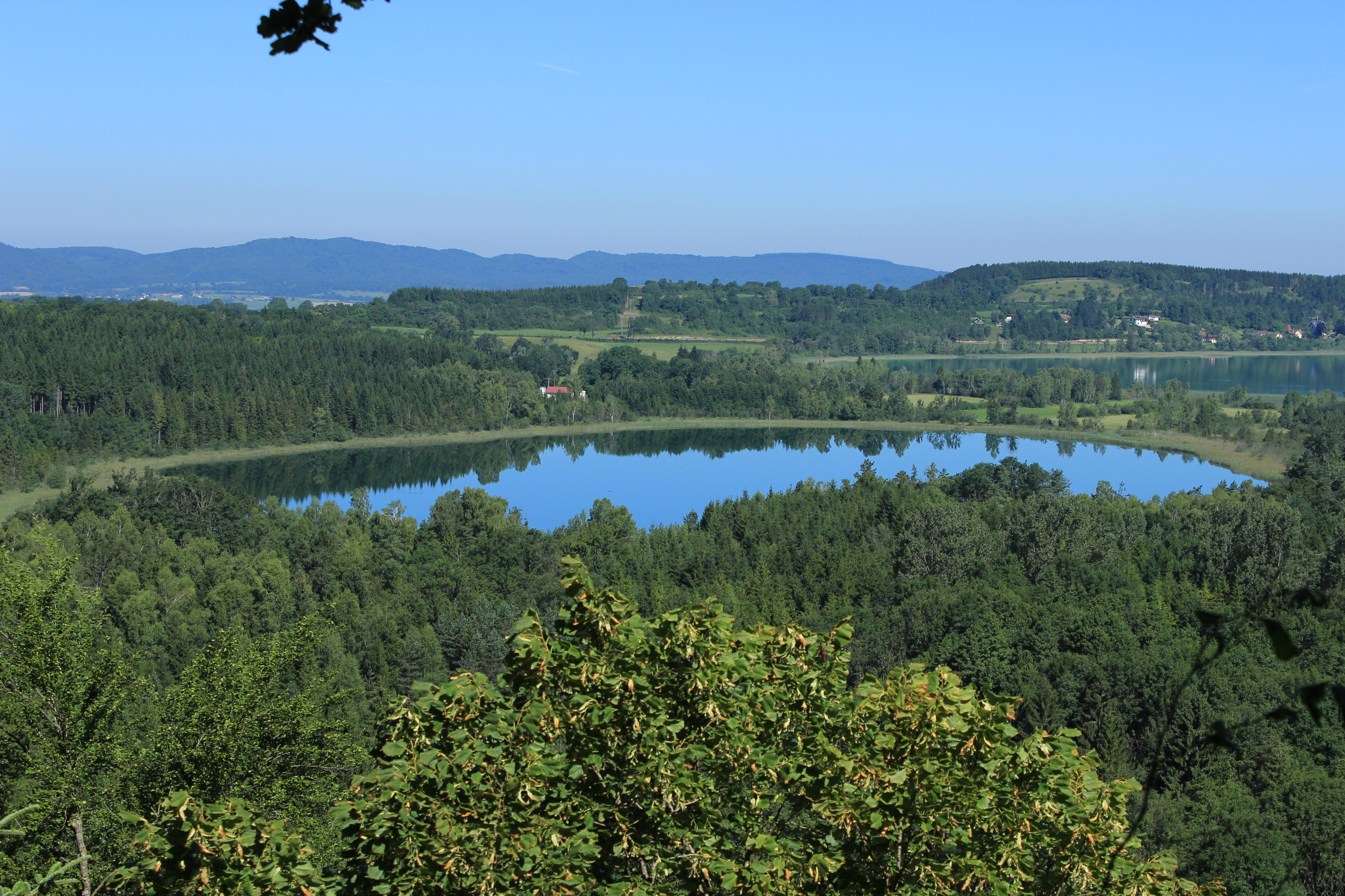 Le petit lac de Clairvaux vu depuis le belvédère de la Scie (Jura, France).